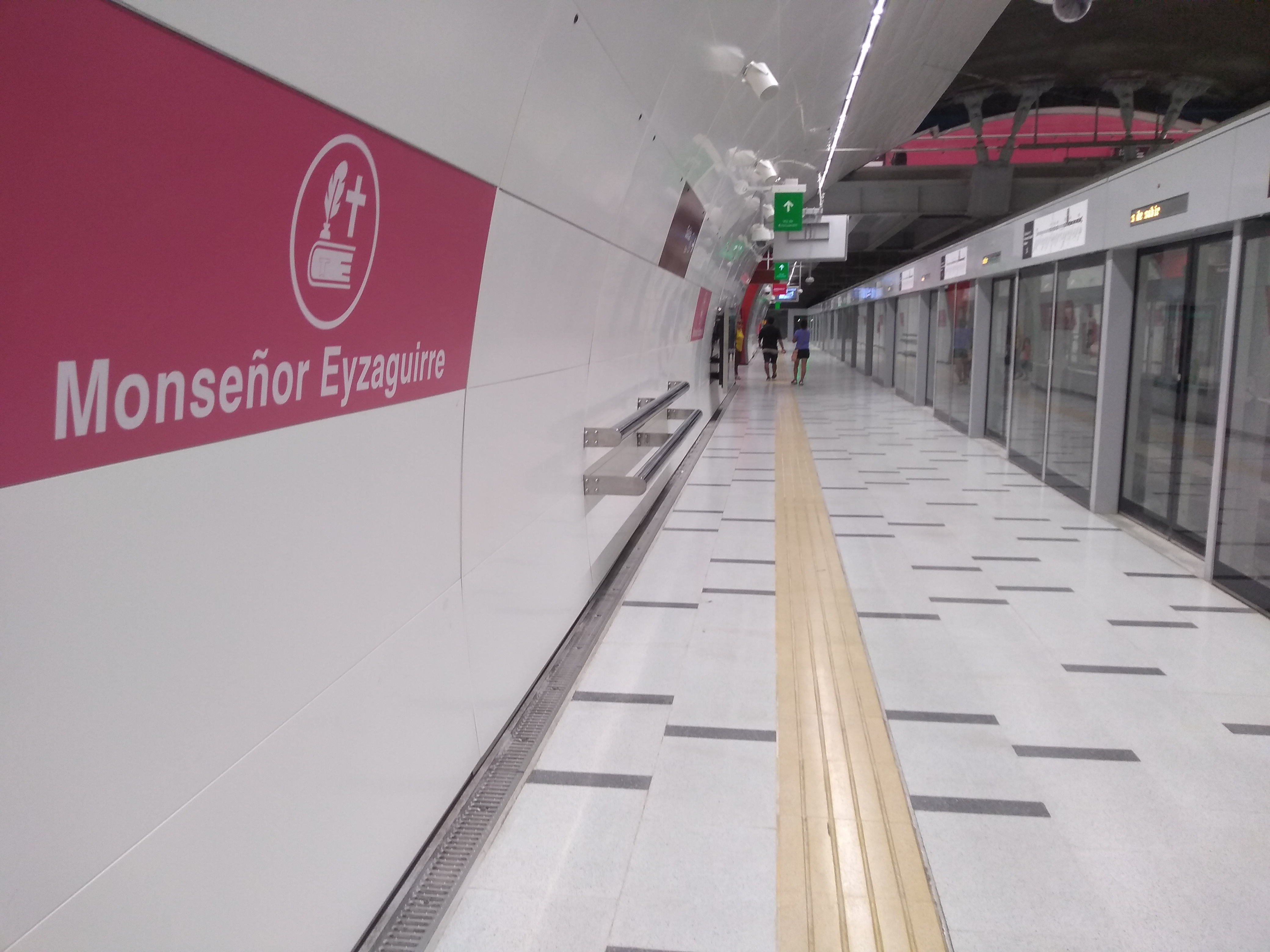 Estación Monseñor Eyzagurre